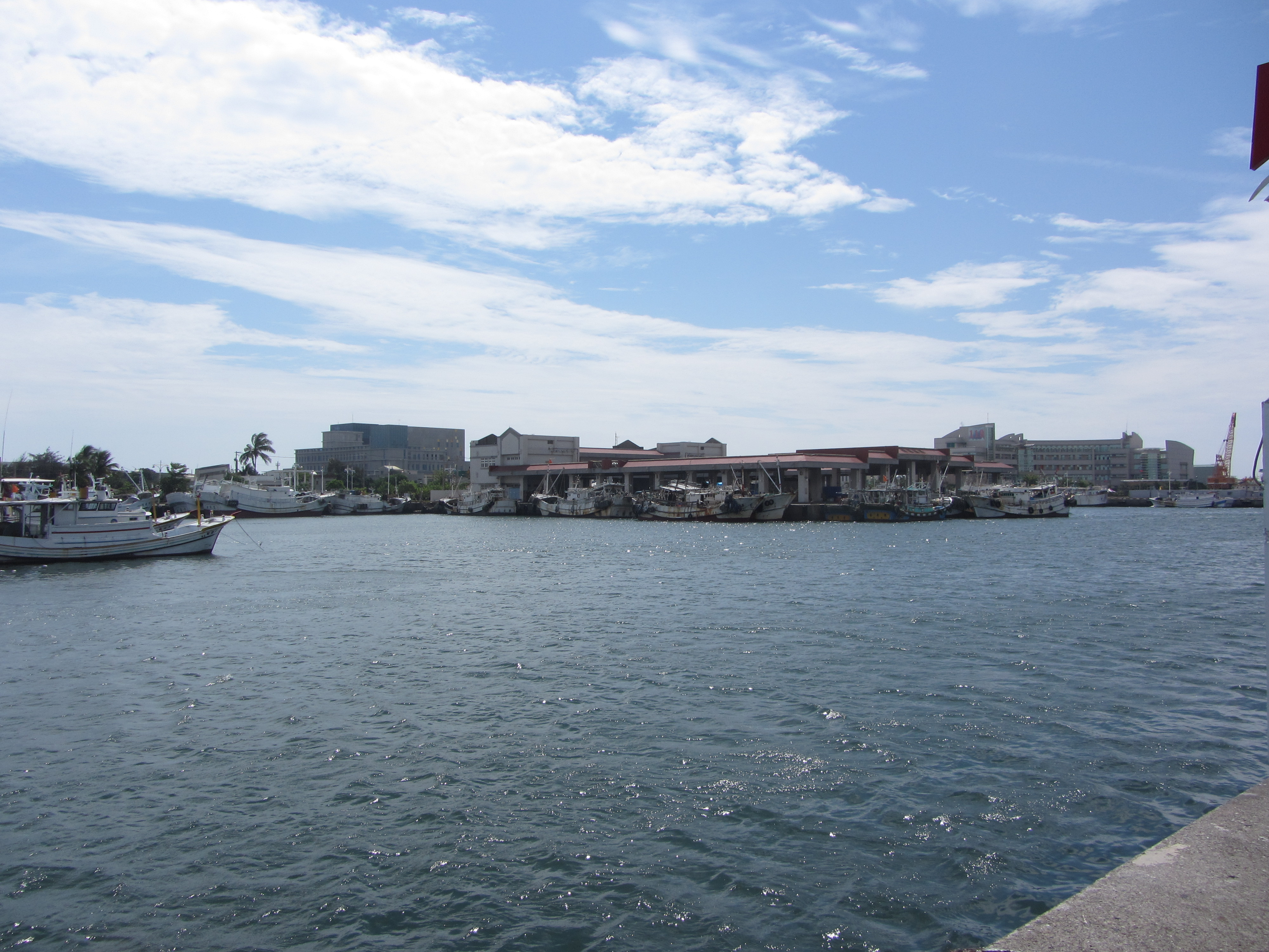 自陽明高雄海洋探索館望向旗津漁港